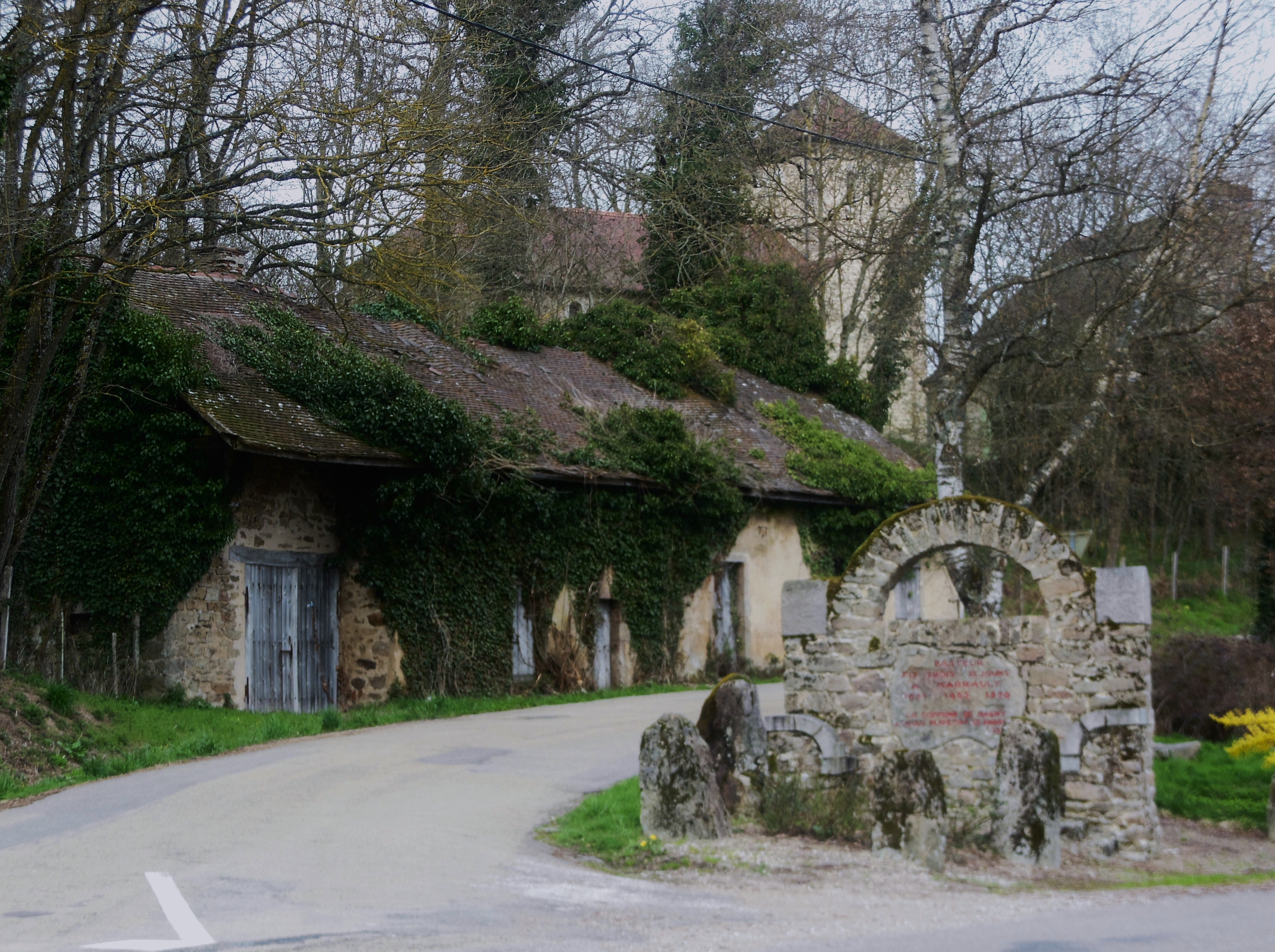 Le monument de Pasteur dans le hameau de Marrault dépendant de la commune de Magny (Yonne, Bourgogne, France).